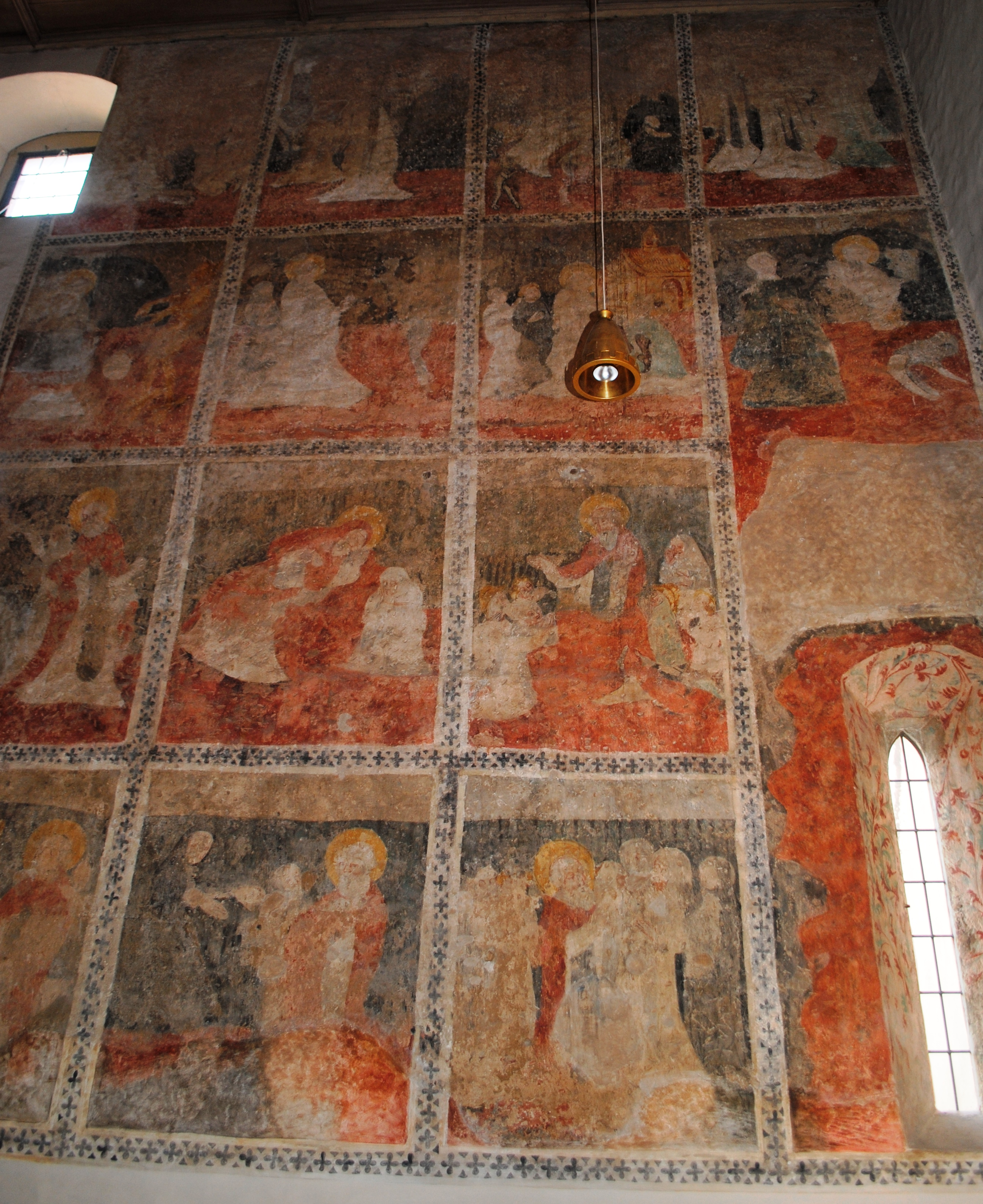 Fresken, Antoniuskapelle, Großlangheim